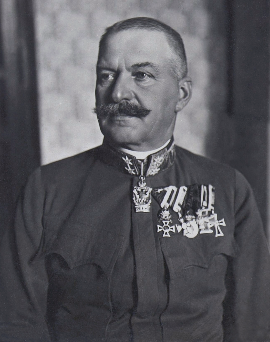 Feldmarschll-Leutnant Albert Freiherr Abele von und zu Lilienberg 1917